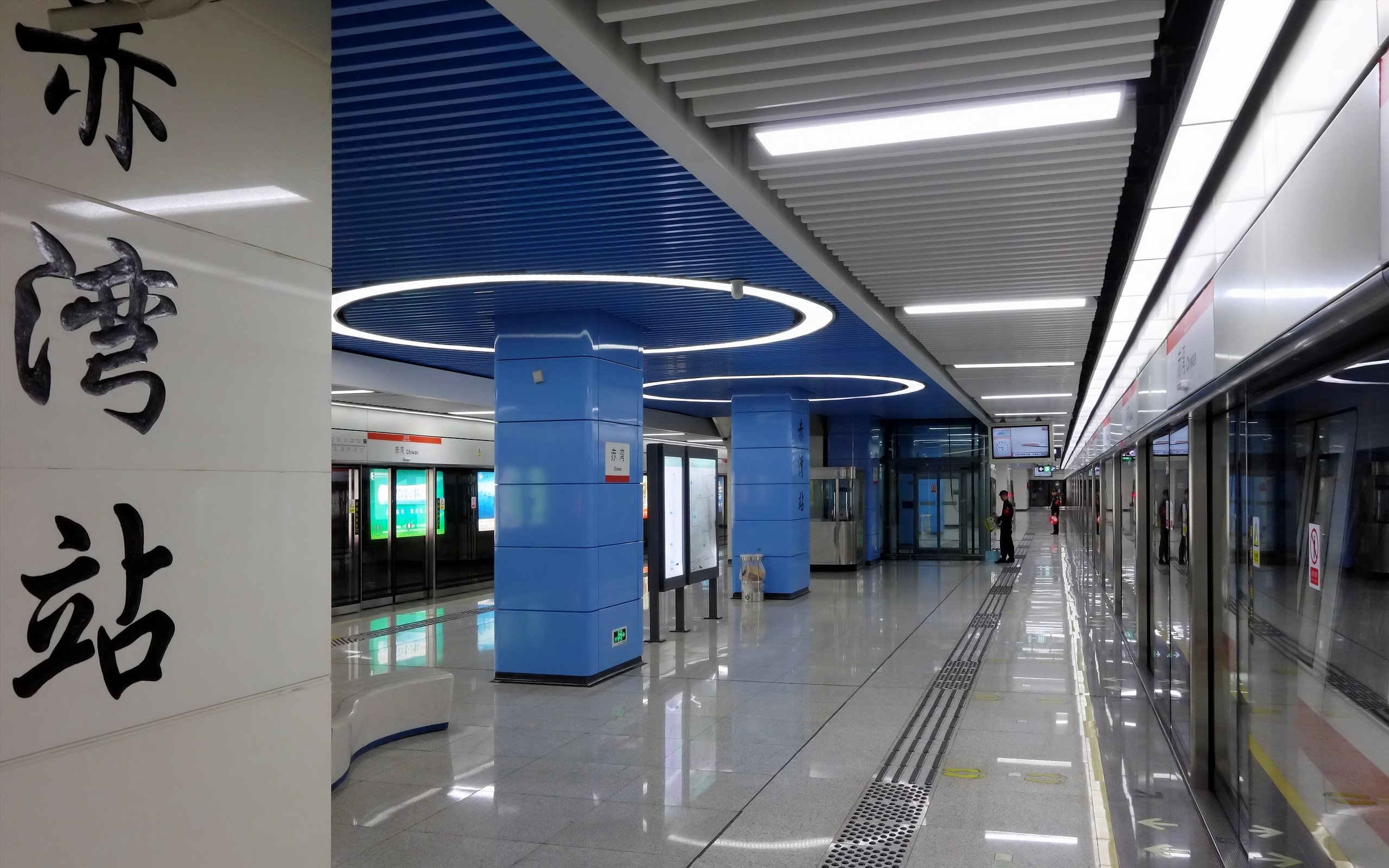 蛇口线赤湾车站站台